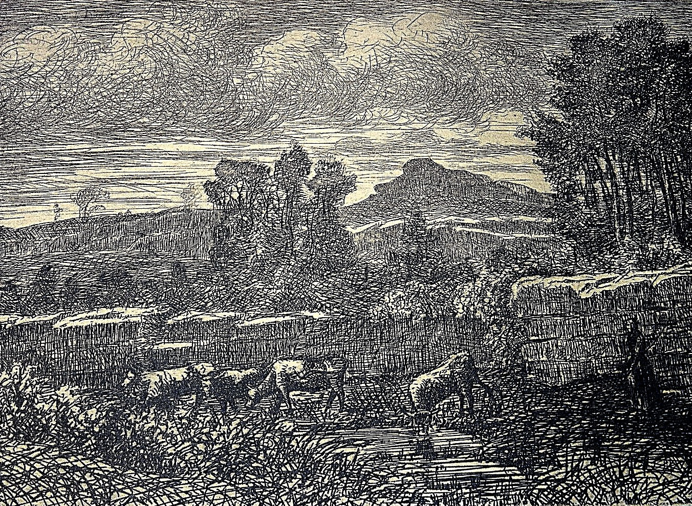 LE GUE Par Xavier DE DANANCHE. Un peintre de l'École de Barbizon.